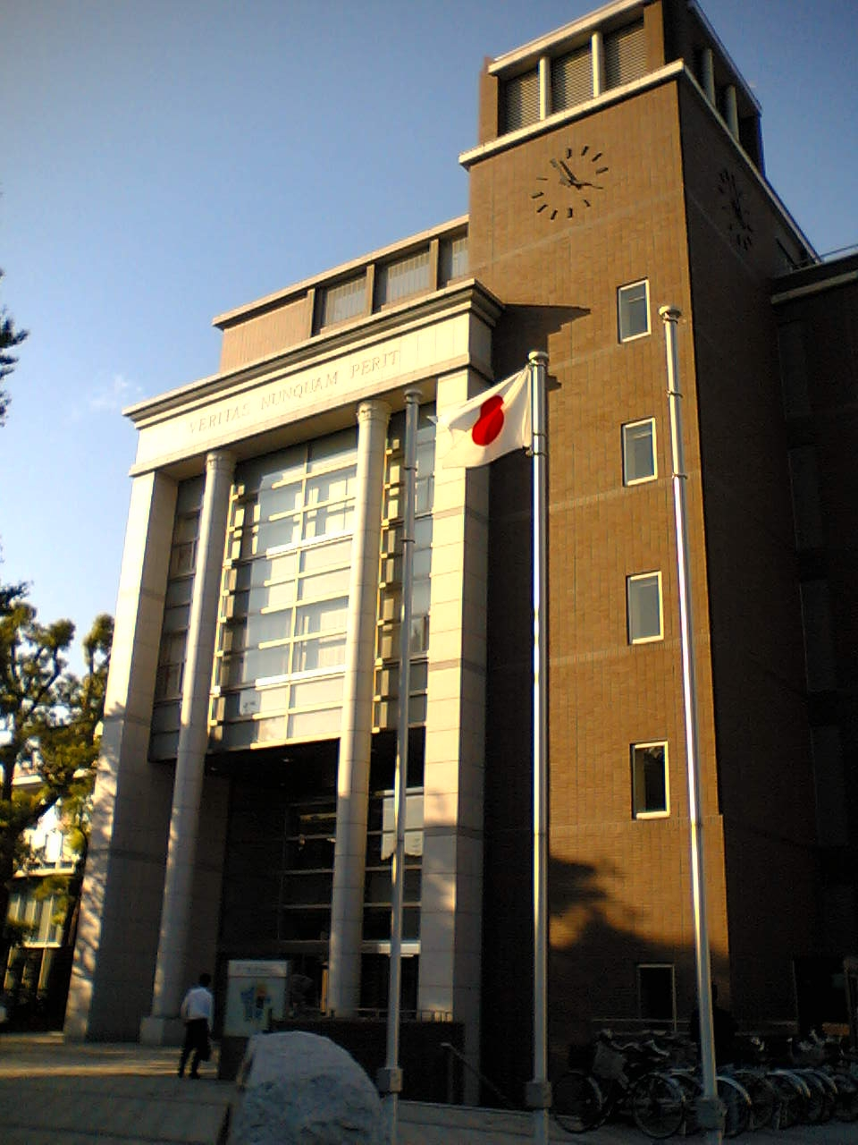 国士舘大学 世田谷校舎。2005年9月29日投稿者自身による撮影。国士舘大学世田谷校舎を世田谷区役所側から撮影。Category:大学の画像